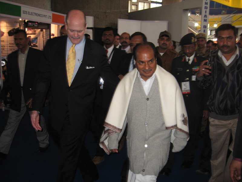 A.K. Anthony